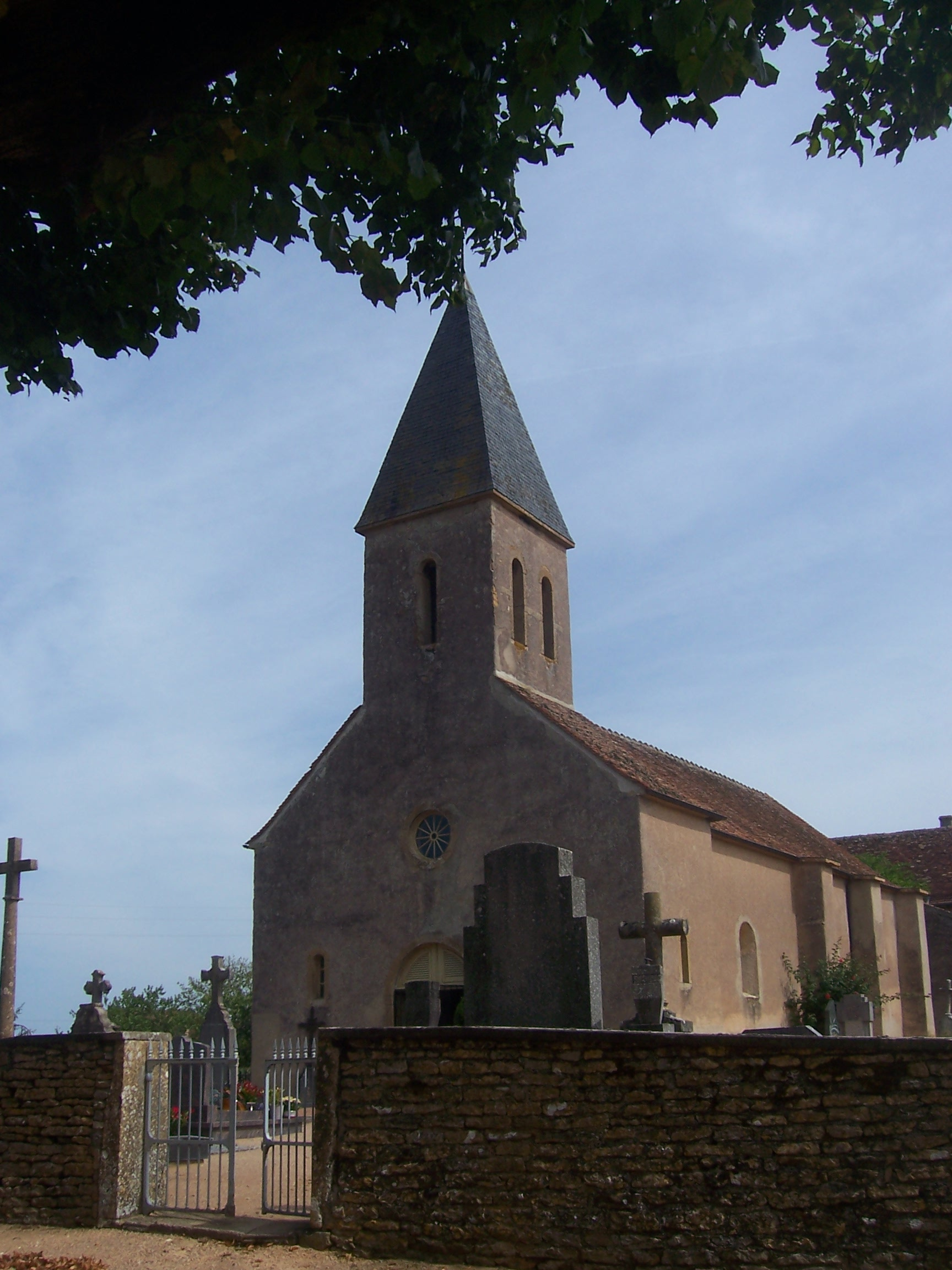 Eglise de Vitry-lès-Cluny